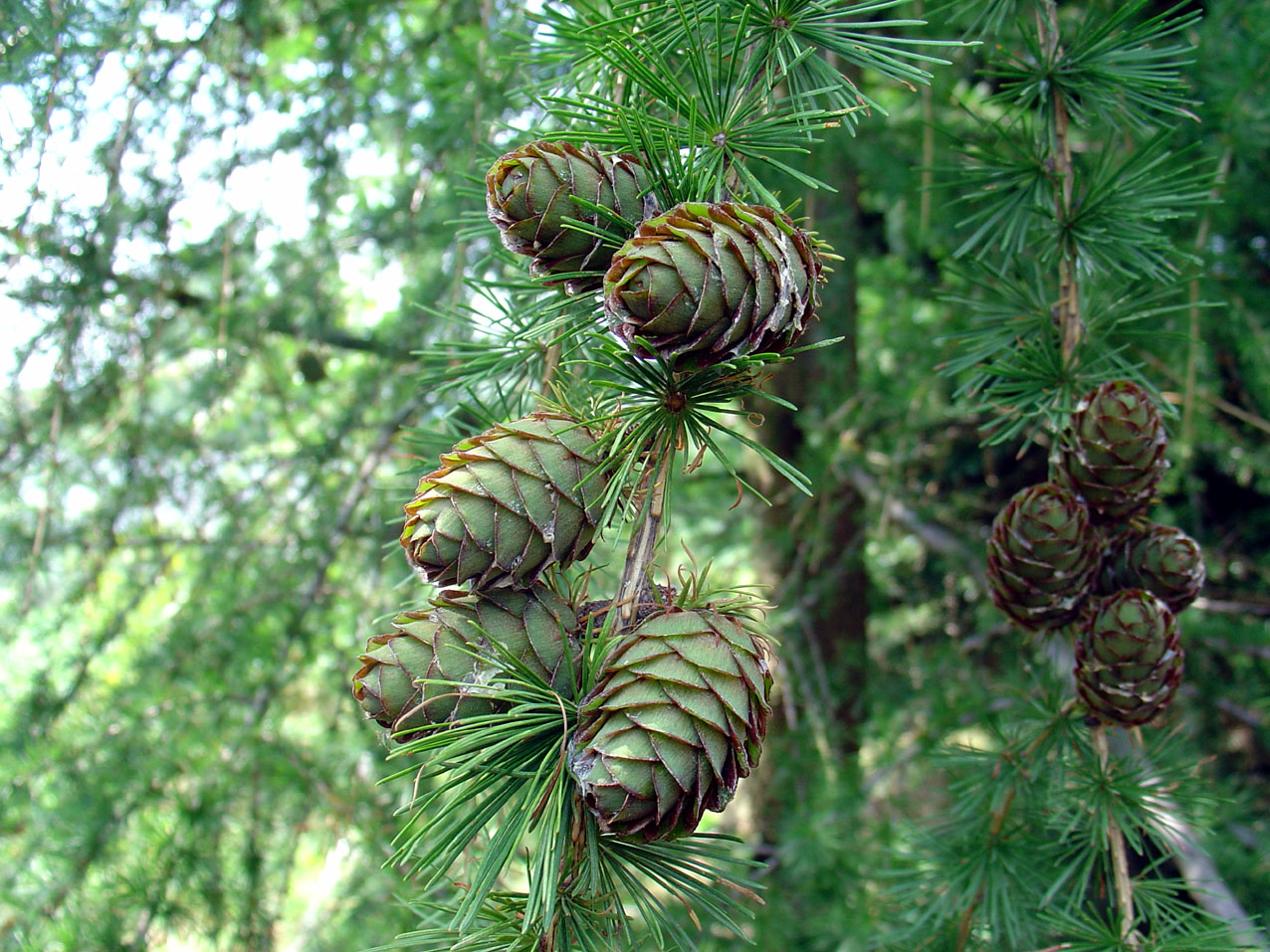 Larix decidua Lärchenzapfen